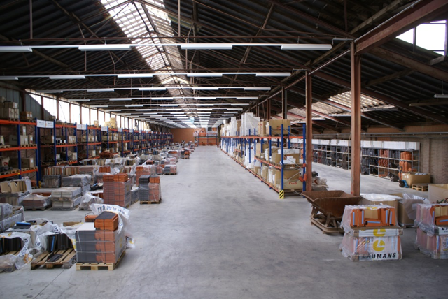 Foto zur Umstrukturierung der Laumans Produktionshallen 2001